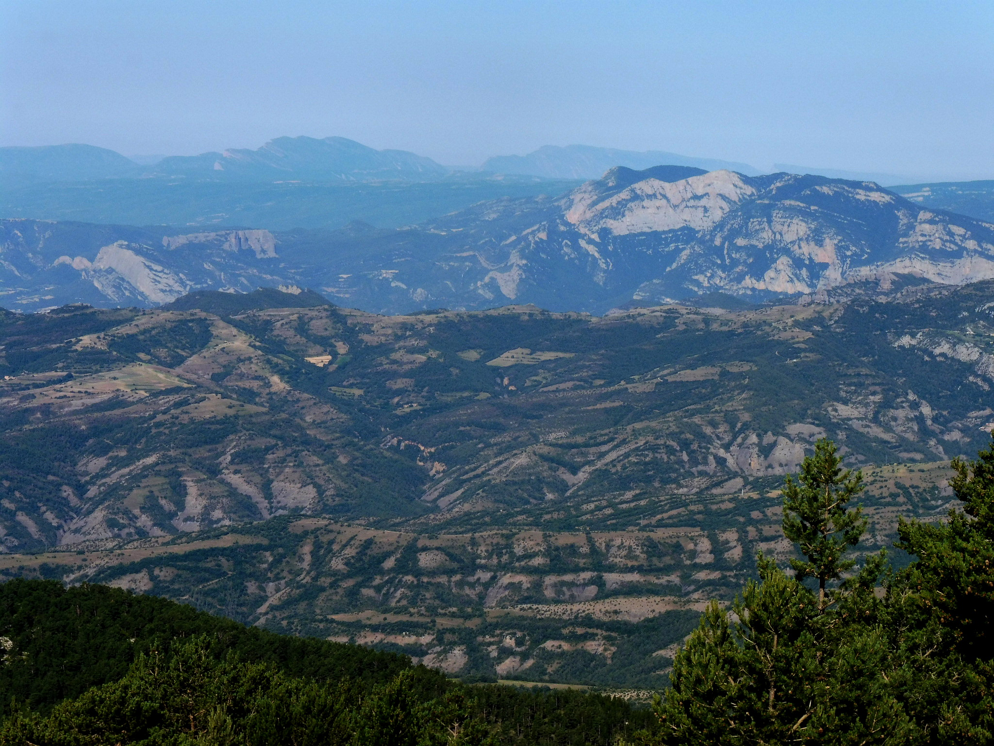 Serra Seca des del Puig Sobirà (Odèn) This is a a photo of a natural area in Catalonia, Spain, with id: ES510189